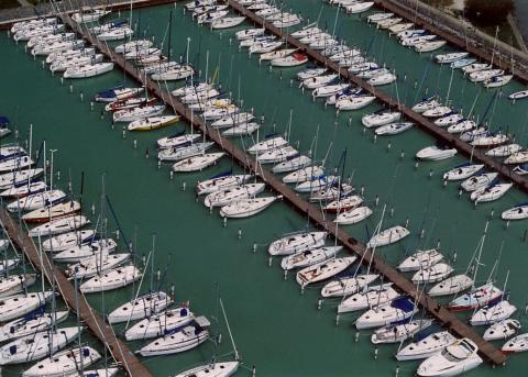 Sennomraj jaĥtoj en Balatonkenese.